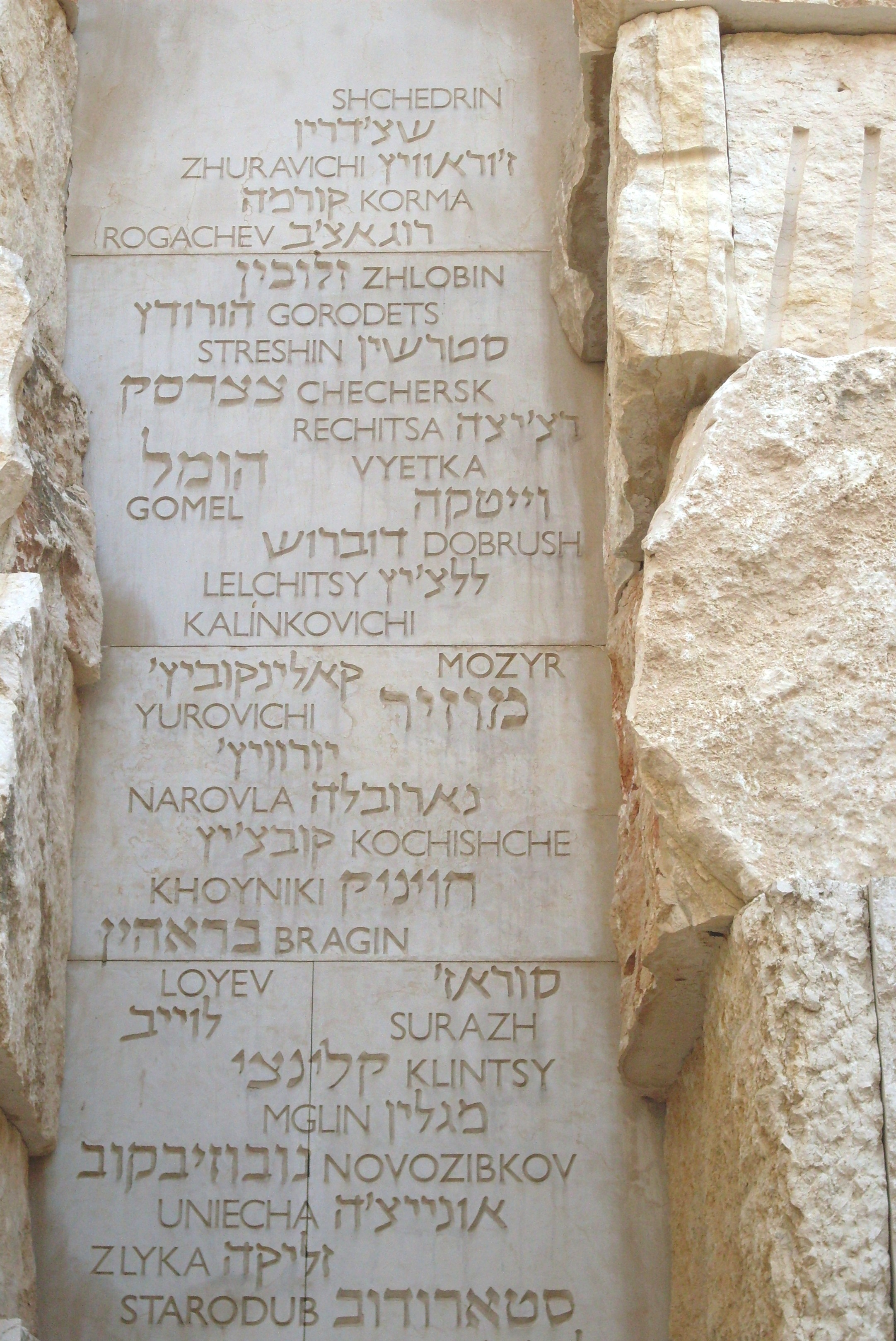 Белорусская часть "Долины разрушенных общин" в Яд Вашем с с названиями еврейских общин на территории послевоенной Беларуси, частично или полностью уничтоженных во время Холокоста.